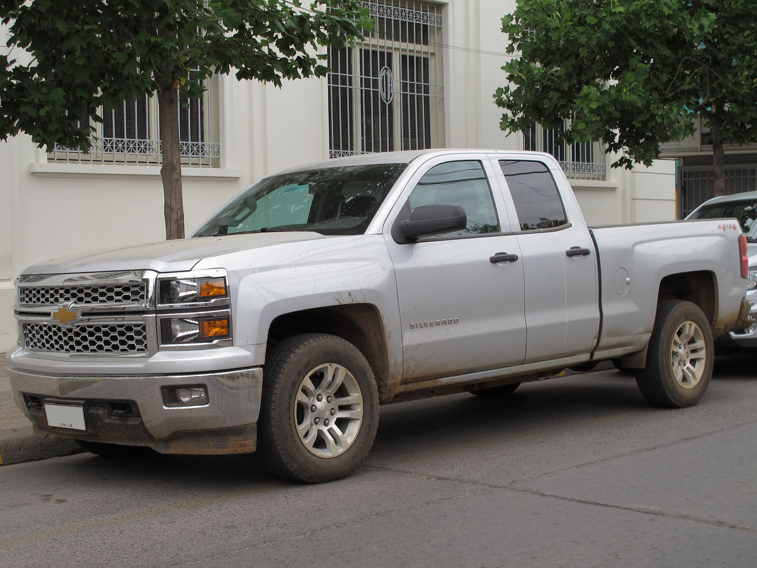 Chevrolet Silverado LT Extended Cab 4x4 2014